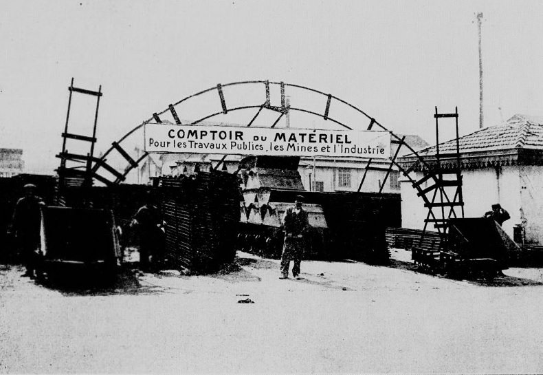 Comptoir du matériel pour les travaux publics, les mines et l'industrie à l'arrière-port de l’Agha (L’Afrique du Nord illustrée, 26 février et 2 avril 1921)